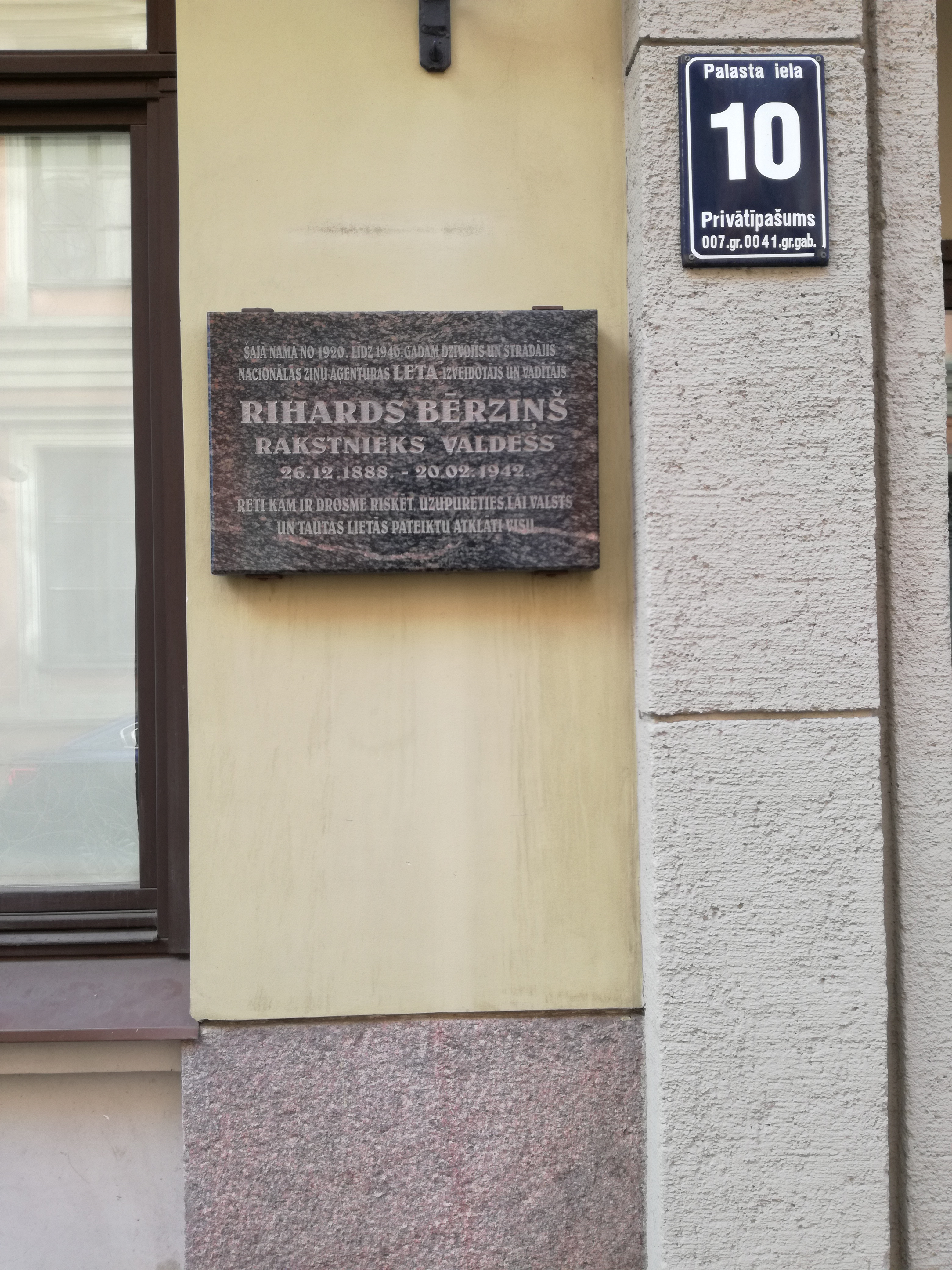 Улица в Старой Риге